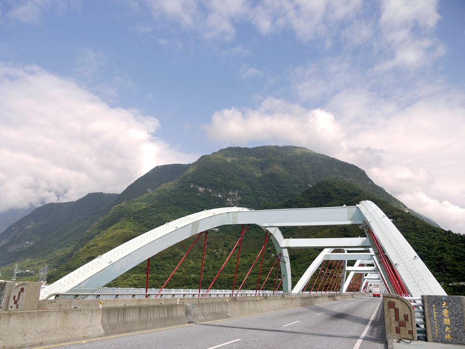 太魯閣大橋